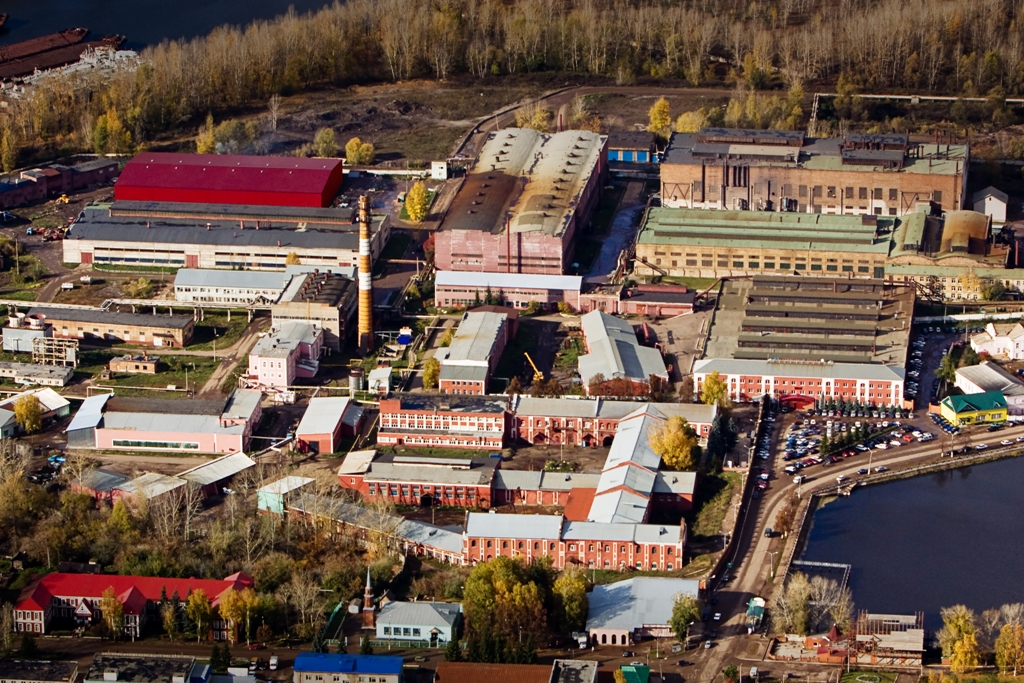 Общий вид завода